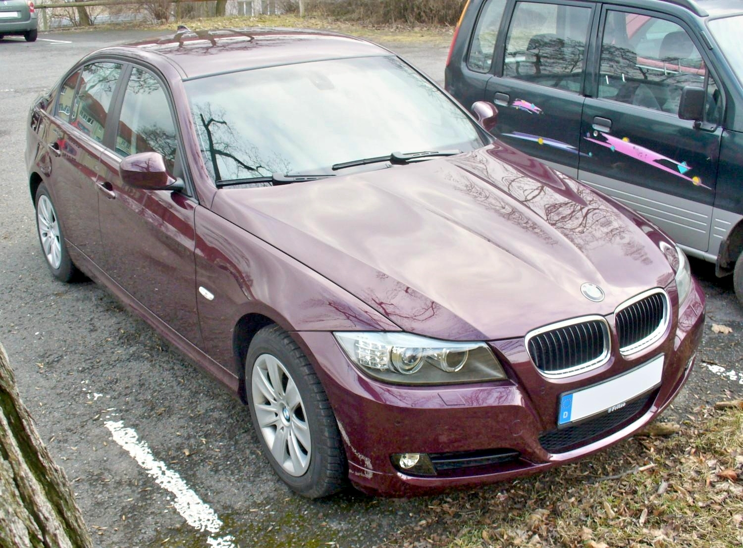 BMW E90 Facelift